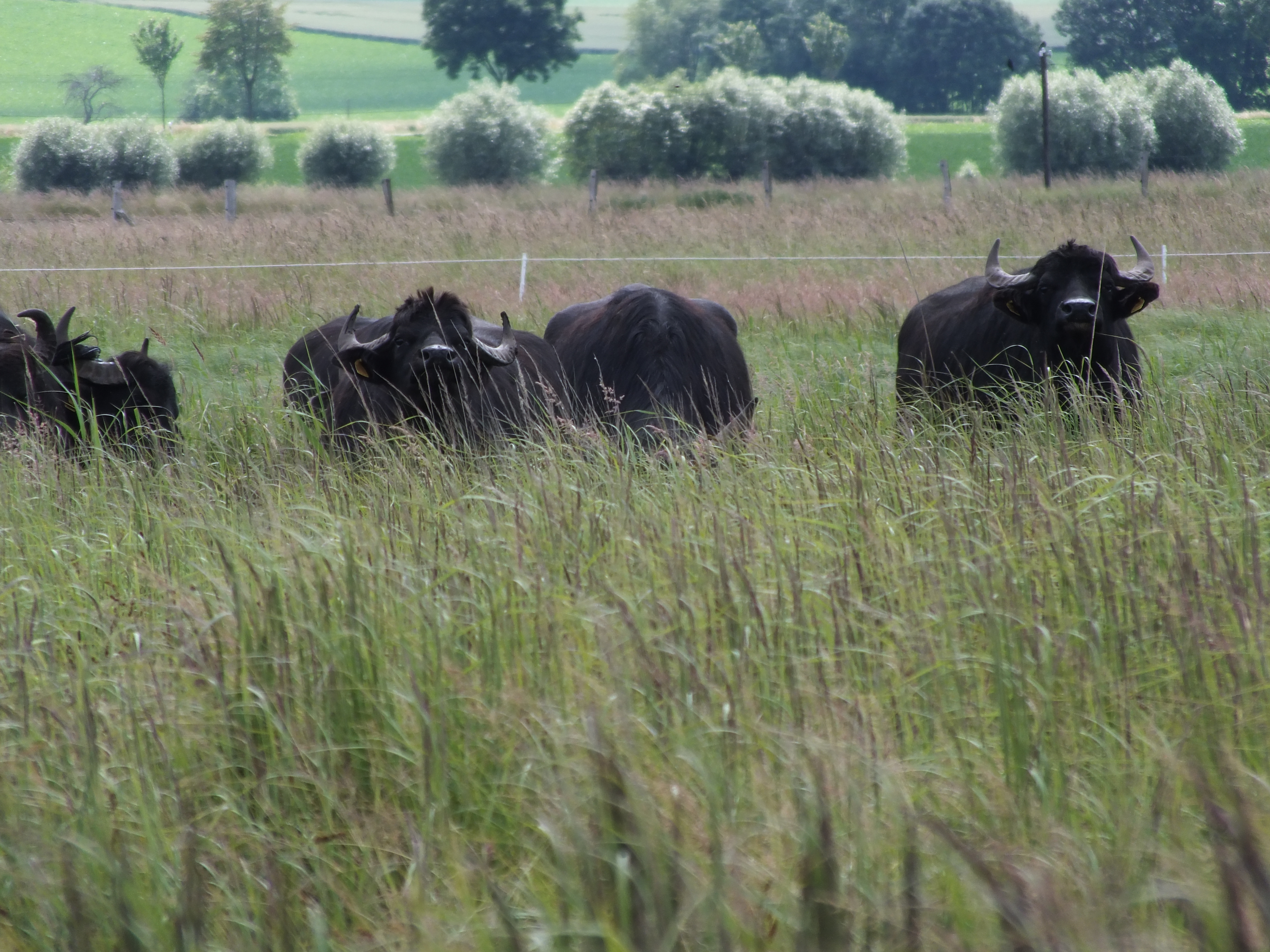 Die Wächter der Salzwiese – Wasserbüffel im Naturschutzgebiet Salzwiese Barnstorf (NSG BR 010).